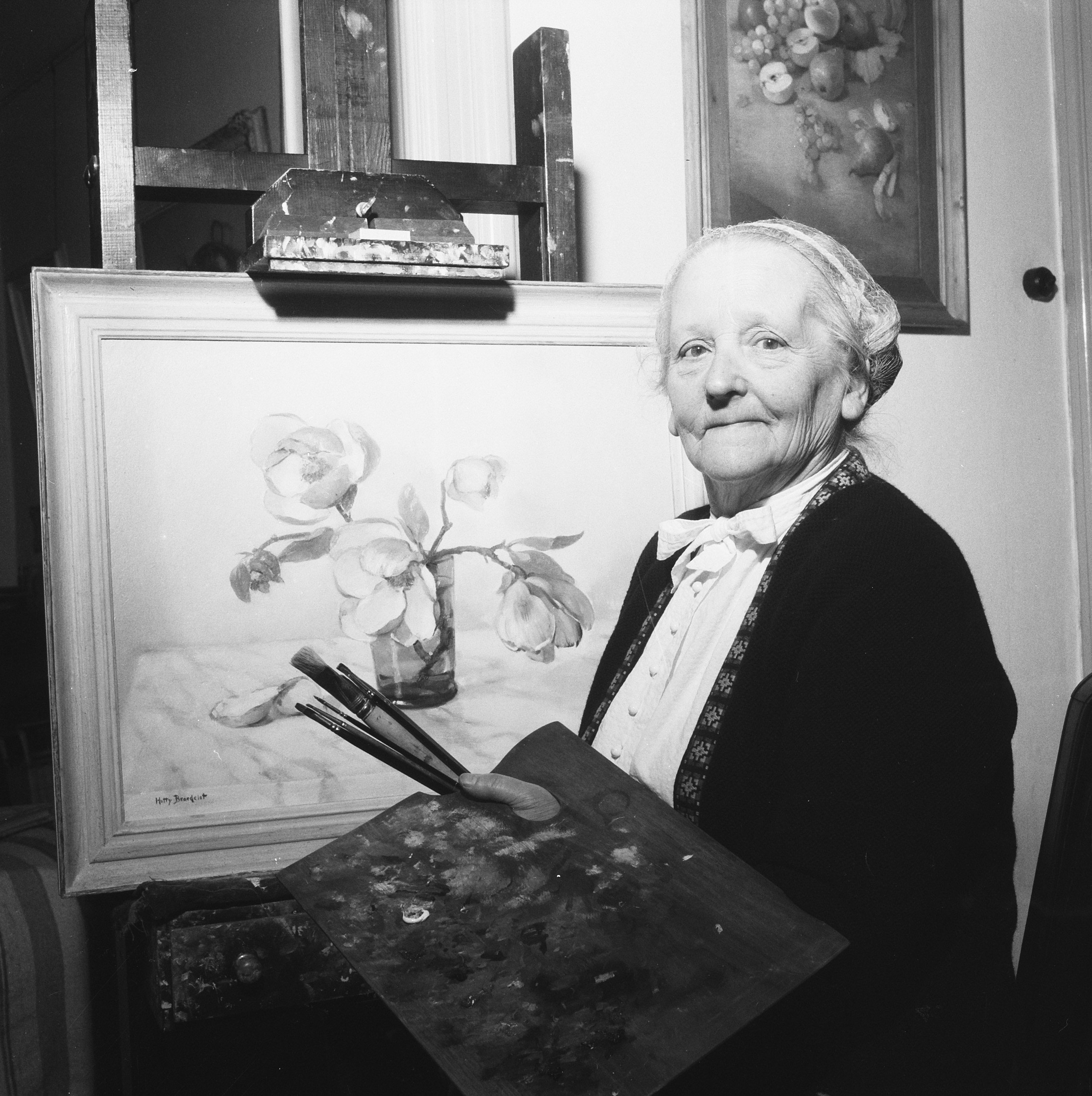 De schilderes Hetty Broedelet-Henkes kort voor haar 80e verjaardag.